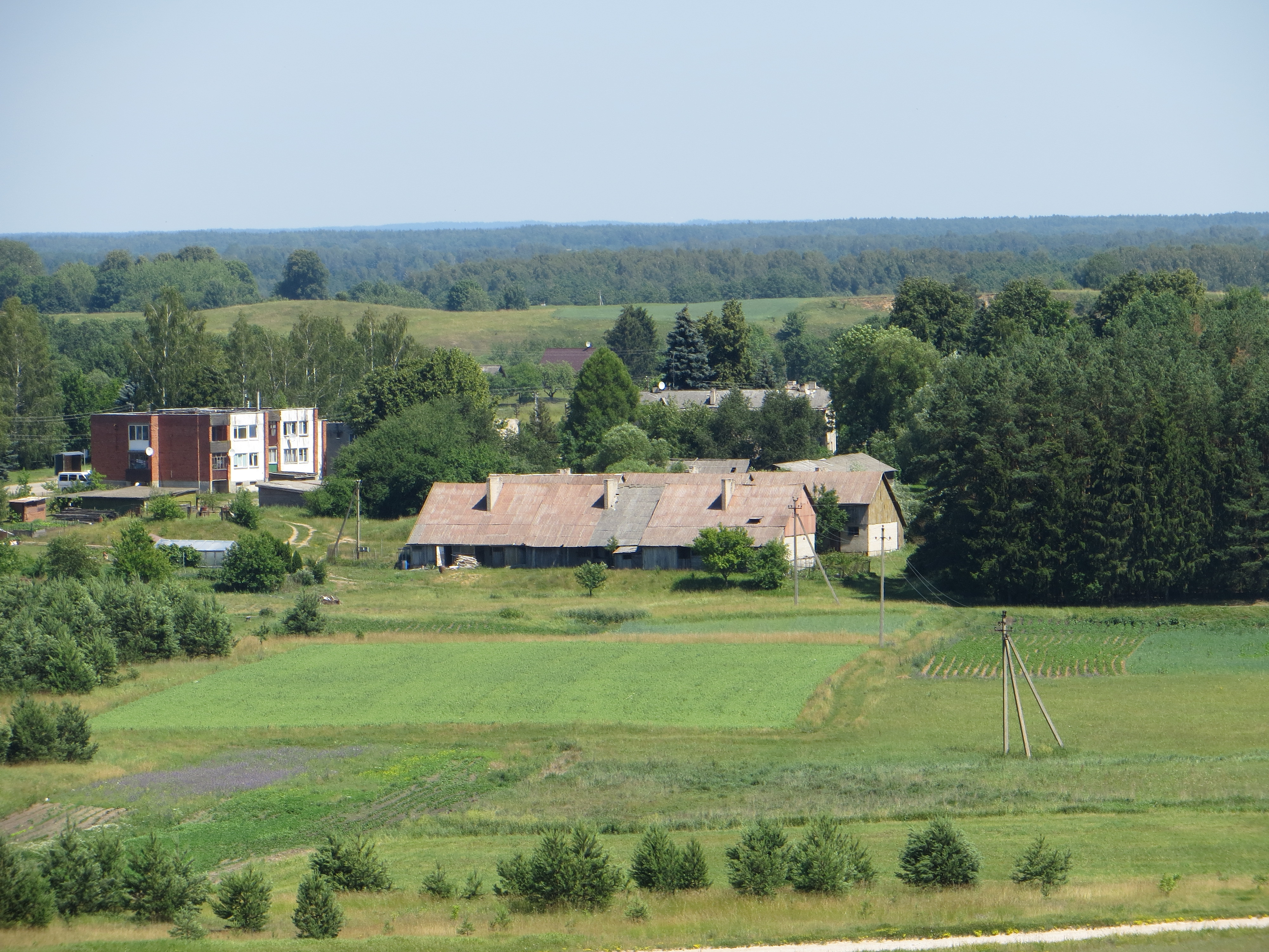 Šiukščiakalnis, Lithuania